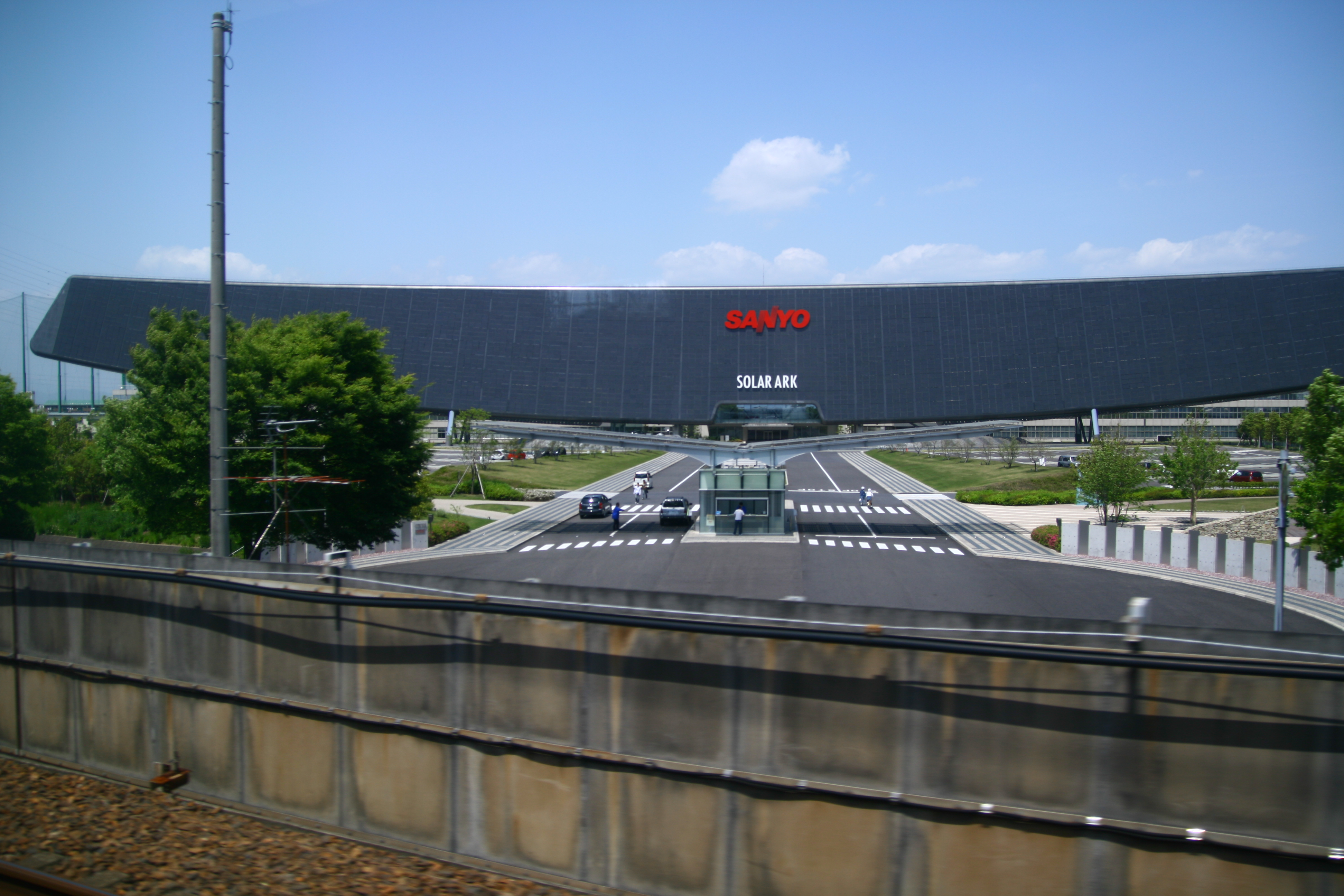 Sanyo Solar Ark